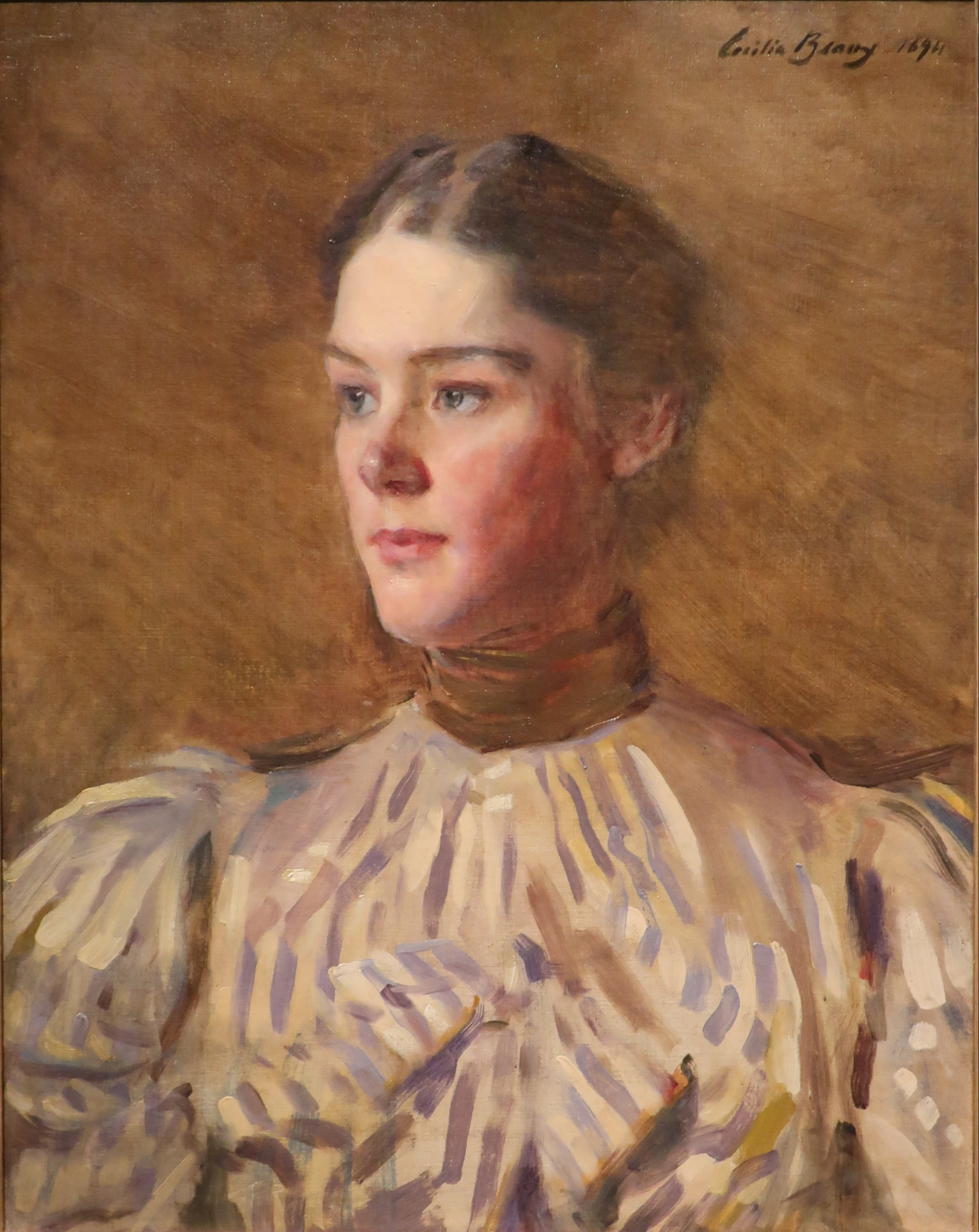 Self-portrait